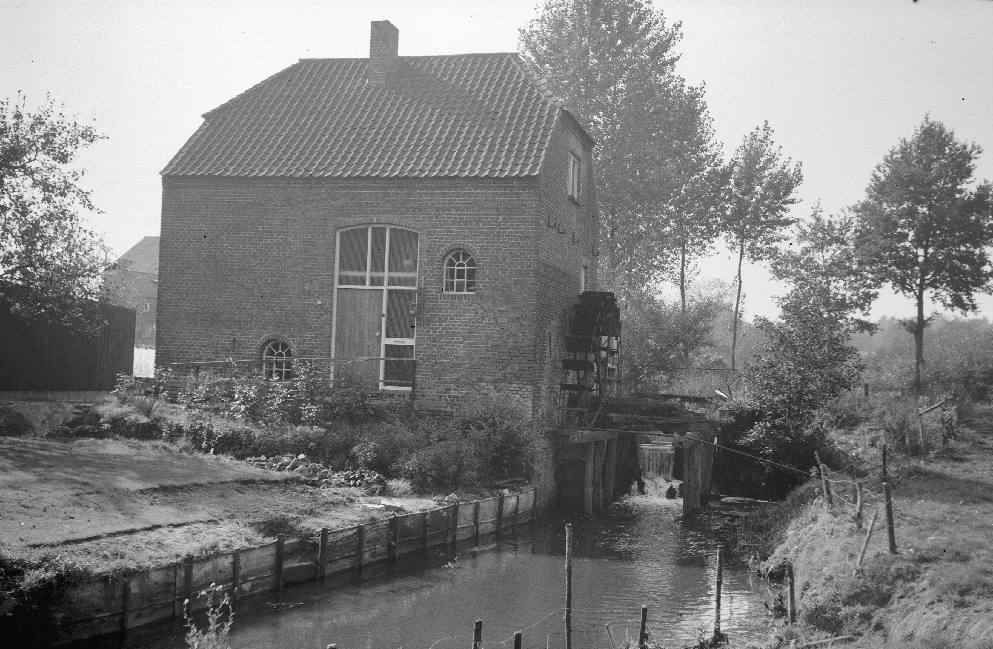 Diversen: Watermolen, St.Wilbertsweg, aanzicht